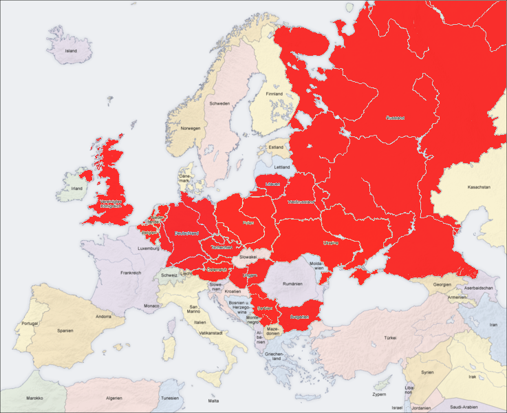 Länder, die 2006 bei der Weltmeisterschaft im Formationstanzen (Latein) teilgenommen haben.